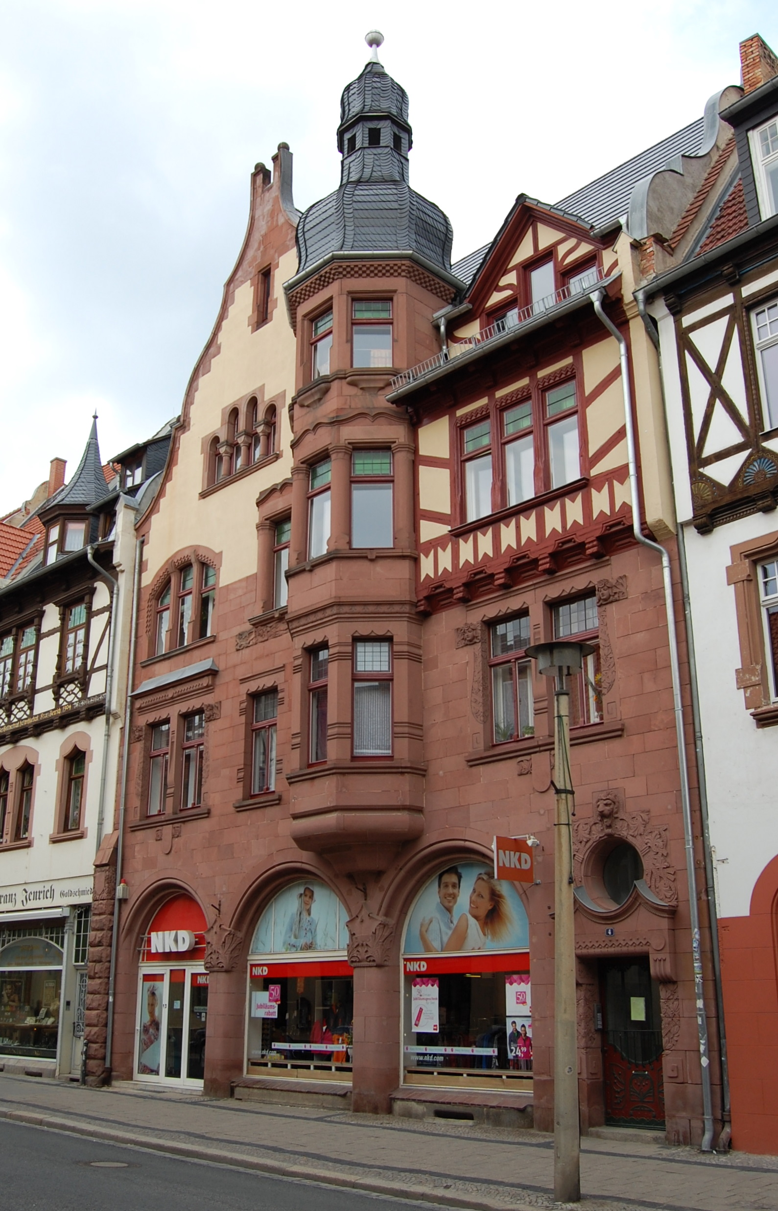 Quedlinburg Heiligegeistraße 4